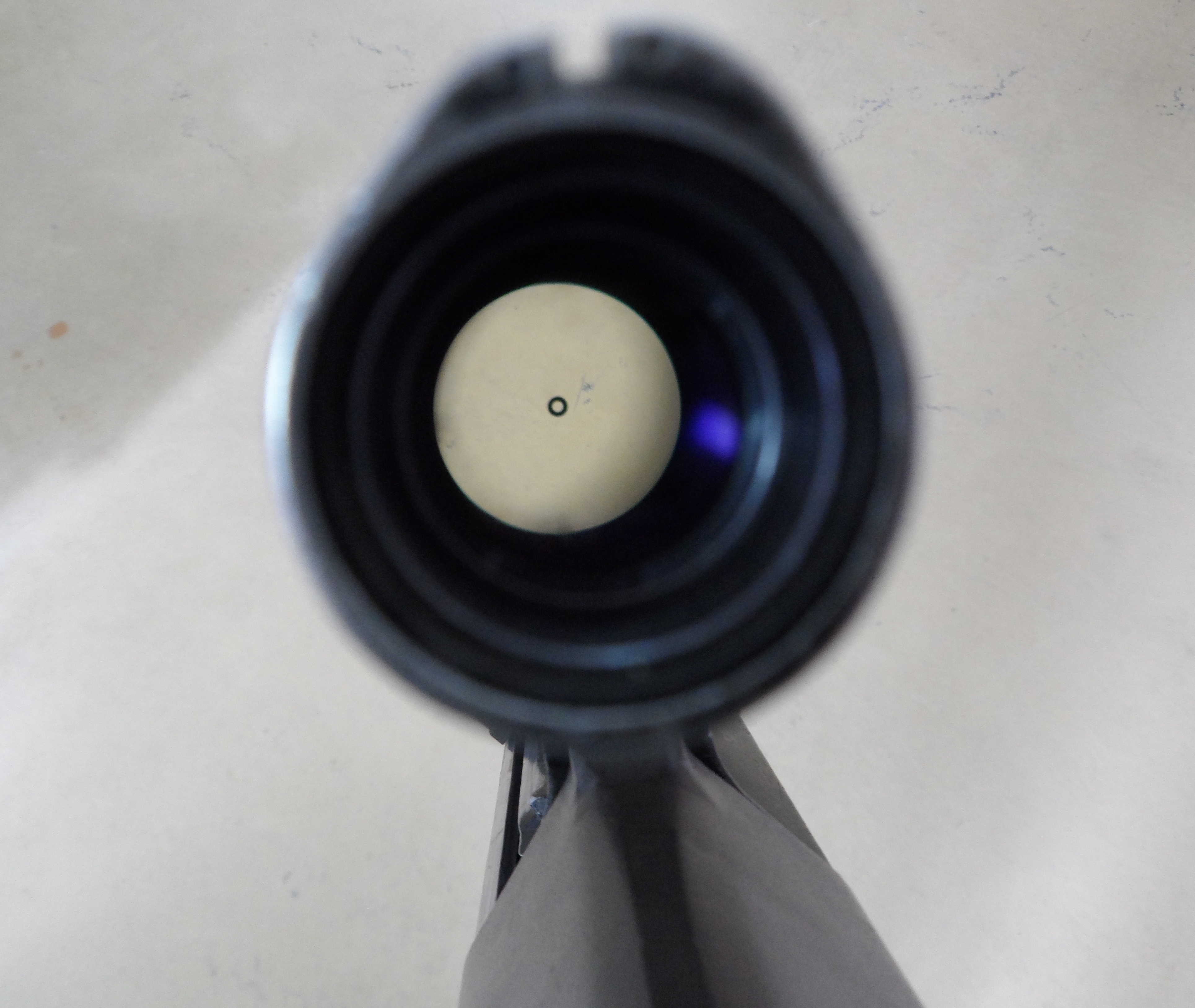 Blick durch optisches Visier mit Kreisabsehen (Steyr AUG; StG 77)